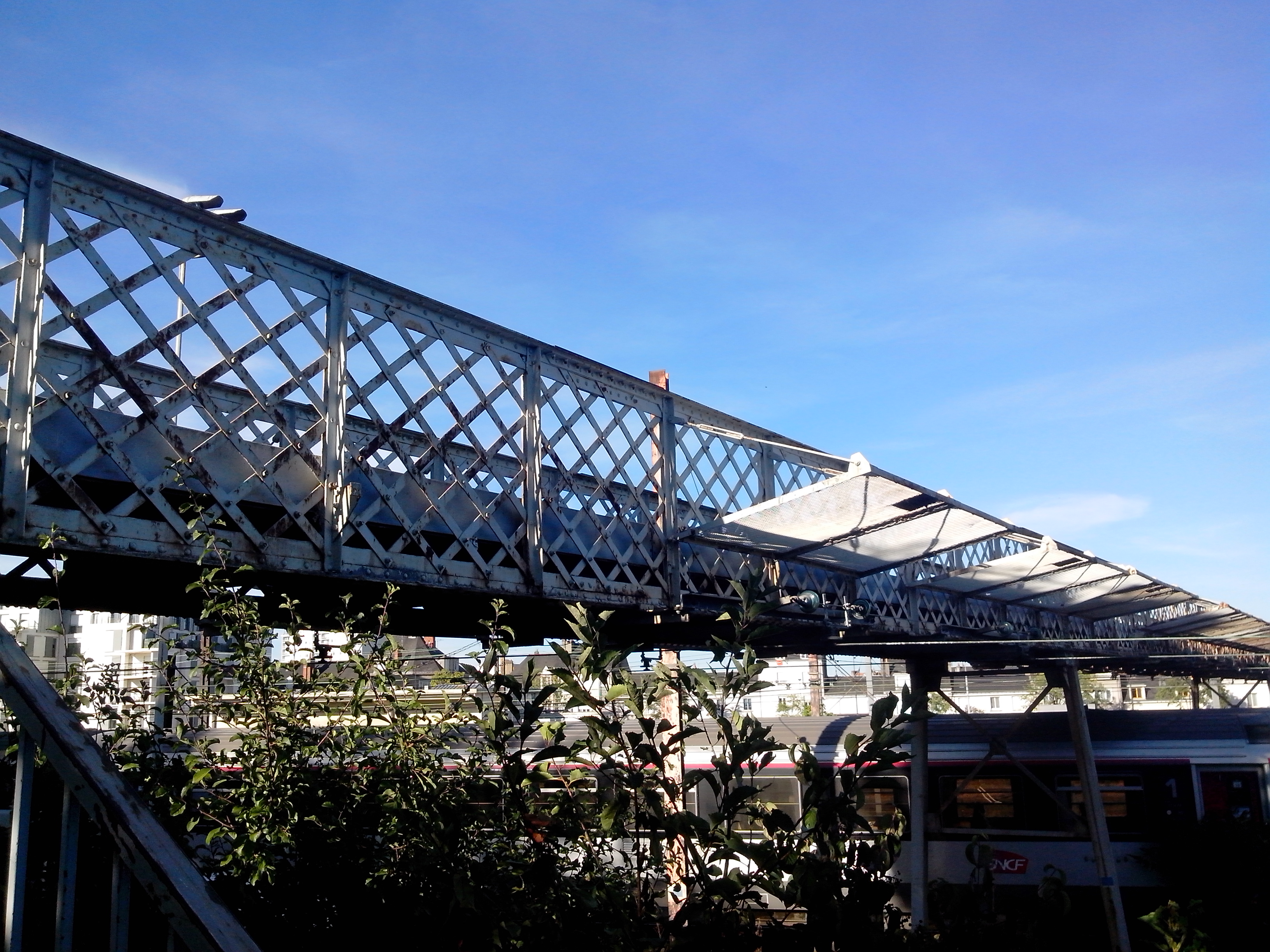 Passerelle Fournier, côté Sanitas